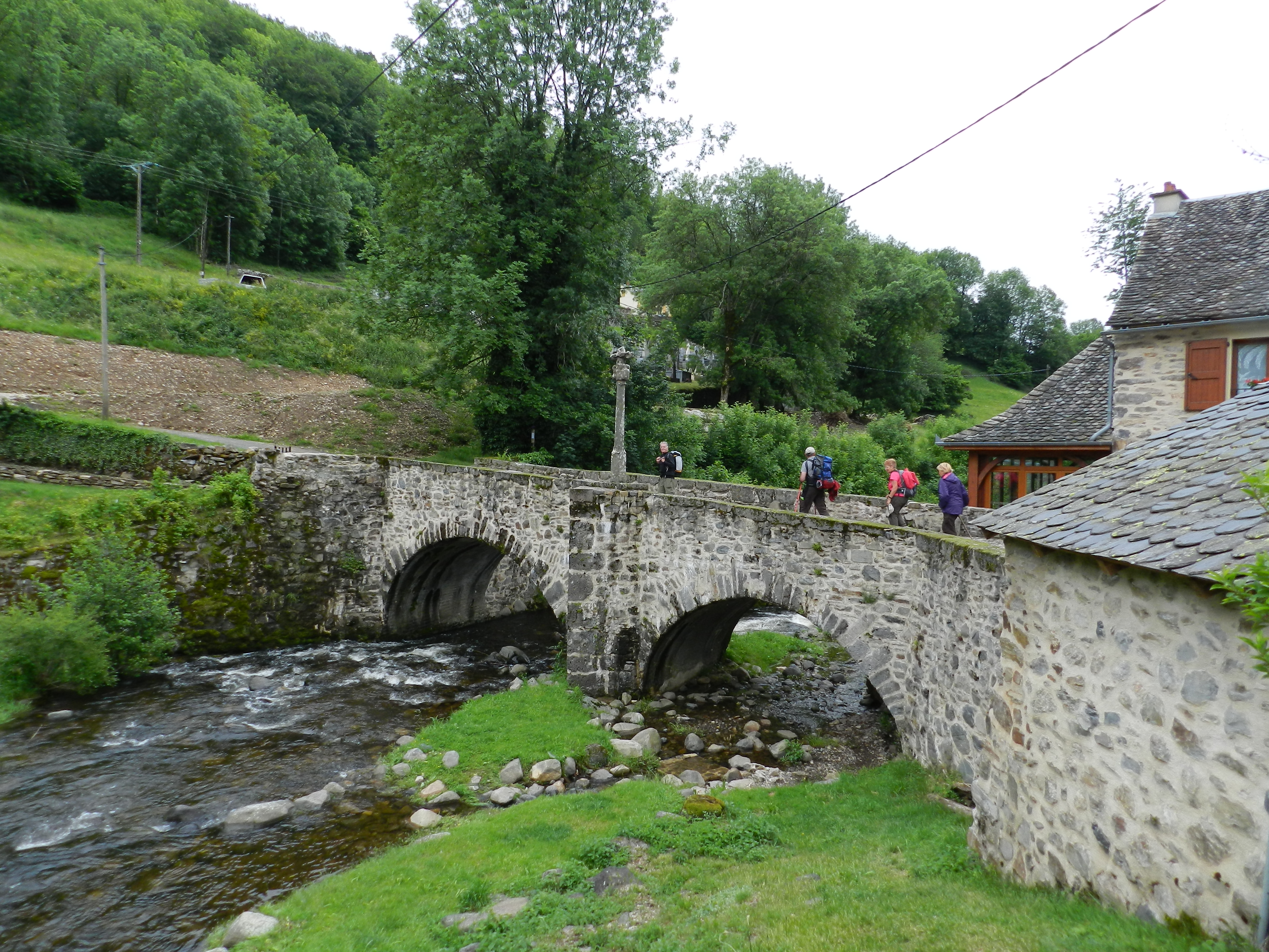 Le Pont des Pèlerins à St Chély d'Aubrac est classé par l'UNESCO, au titre des Chemins de Compostelle en tant que "Bien culturel"